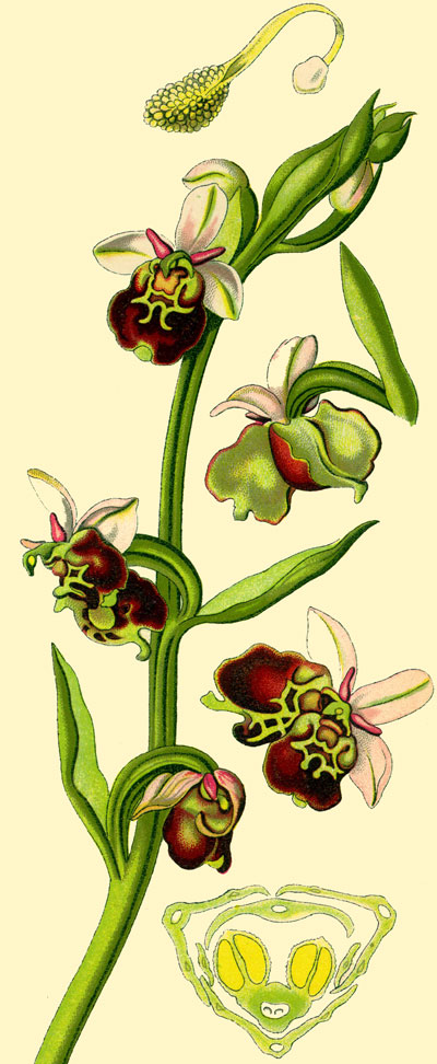 Ophrys fuciflora Flora von Deutschland... (right side)